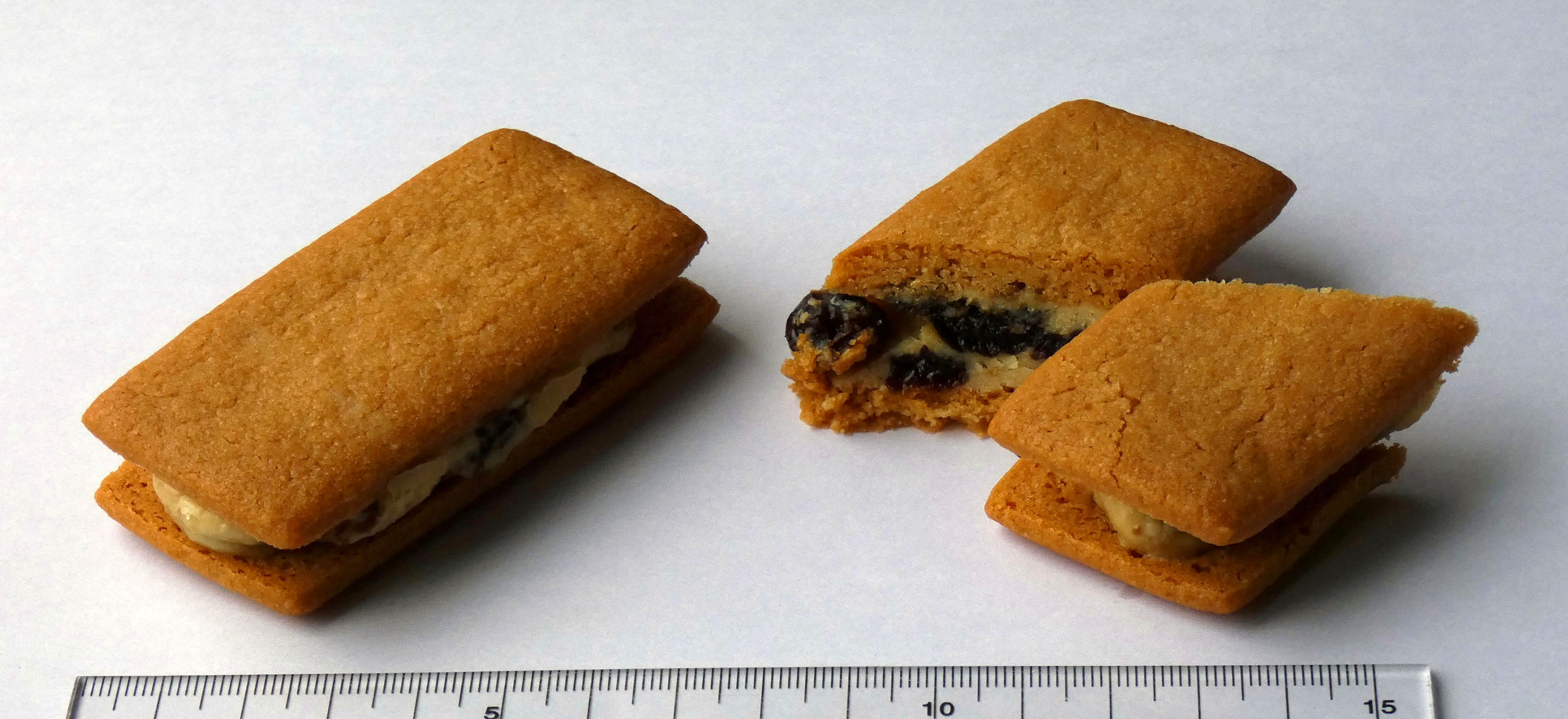 六花亭 マルセイバターサンド（1個 130円）